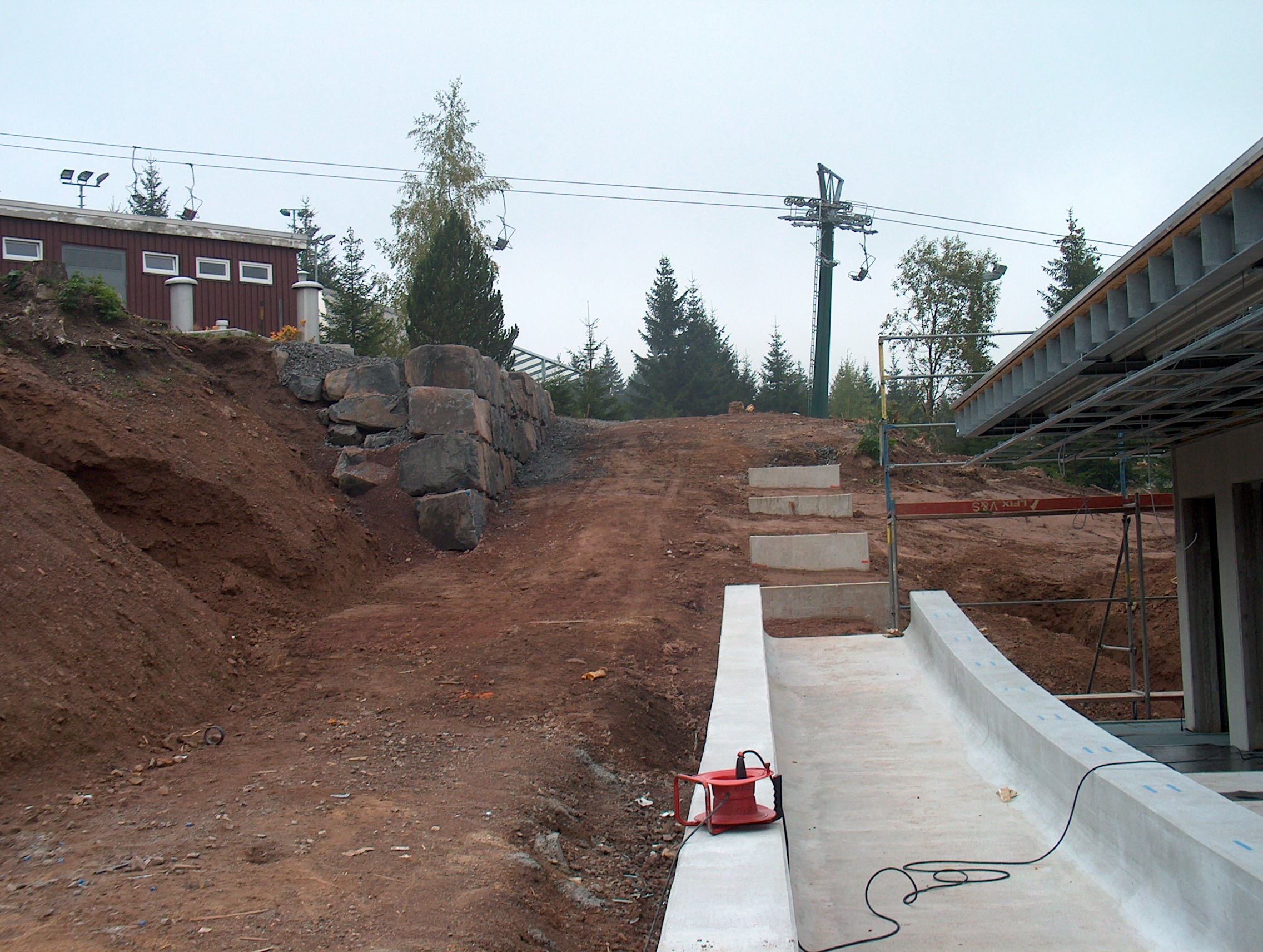 Neuer Auslauf und Wiegehaus der Rennrodelbahn Oberhof